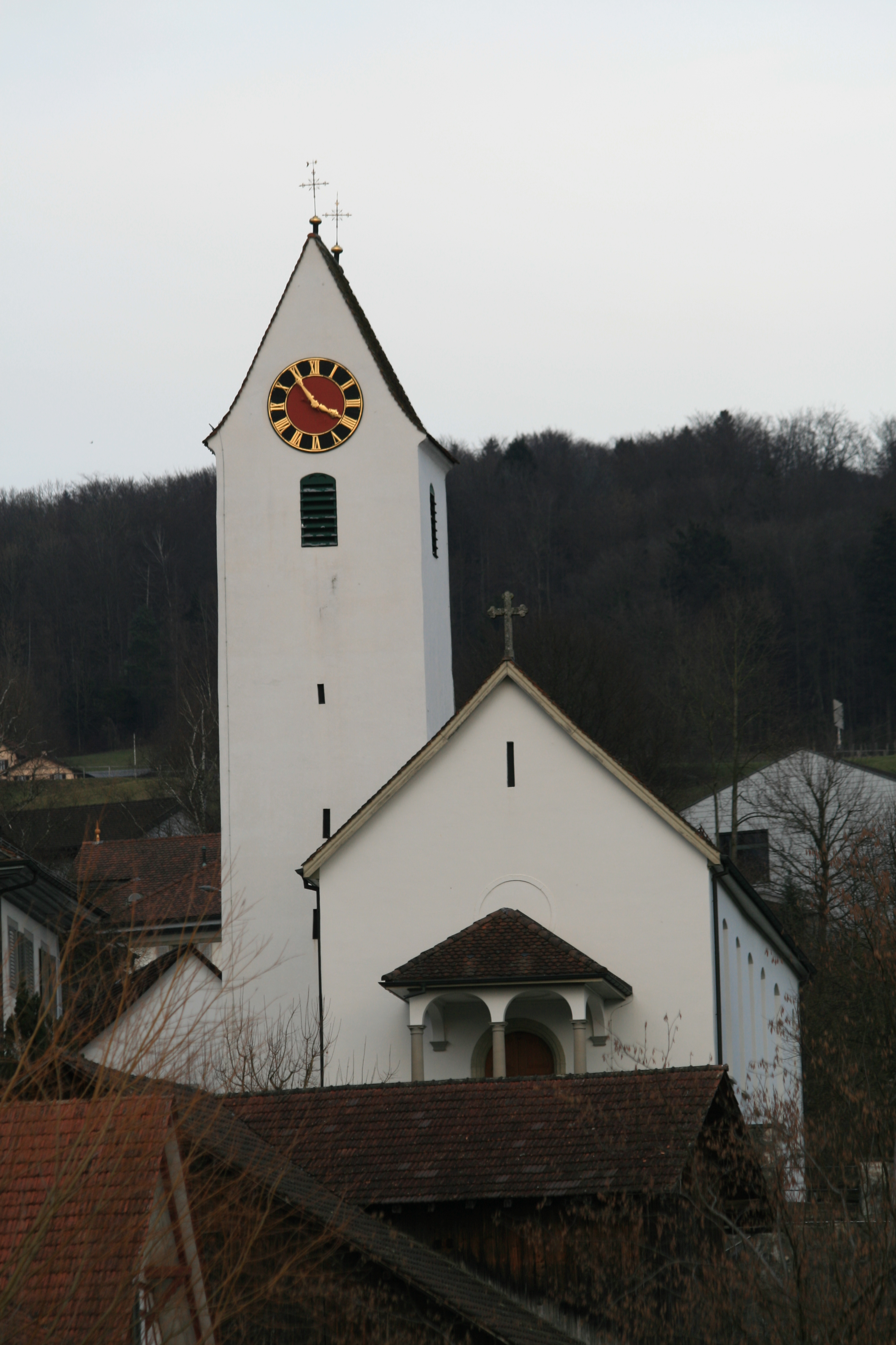 Kirche Eggenwil